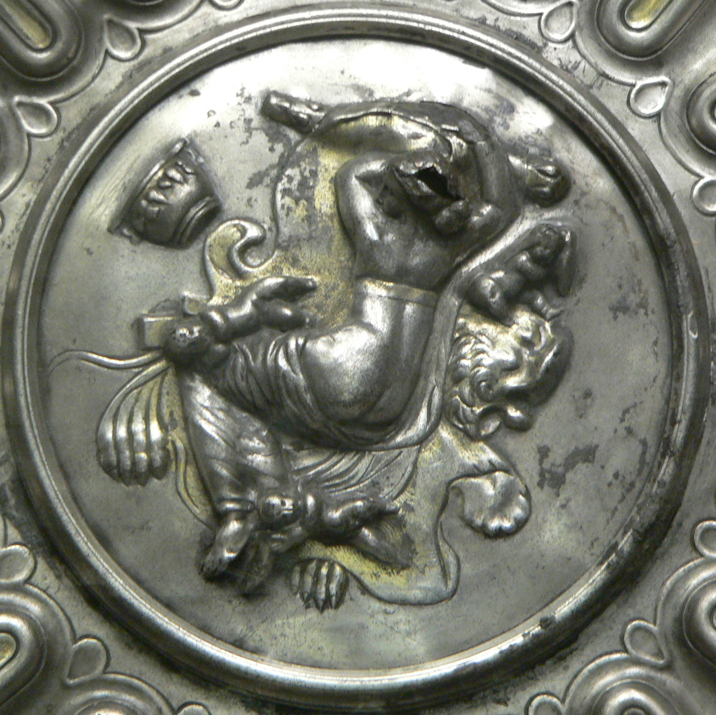 Bassin côtelé Bassin côtelé, détail. Trésor de Berthouville, argent, 1ère moitié du Ie siècle ap. J.-C.Décor: Au centre, Omphale endormie sur la peau du lion de Némée, vec la massue et l'arc d'Hercule. Le bassin a été offert à Mercure par Quintus Domitius Tutus.